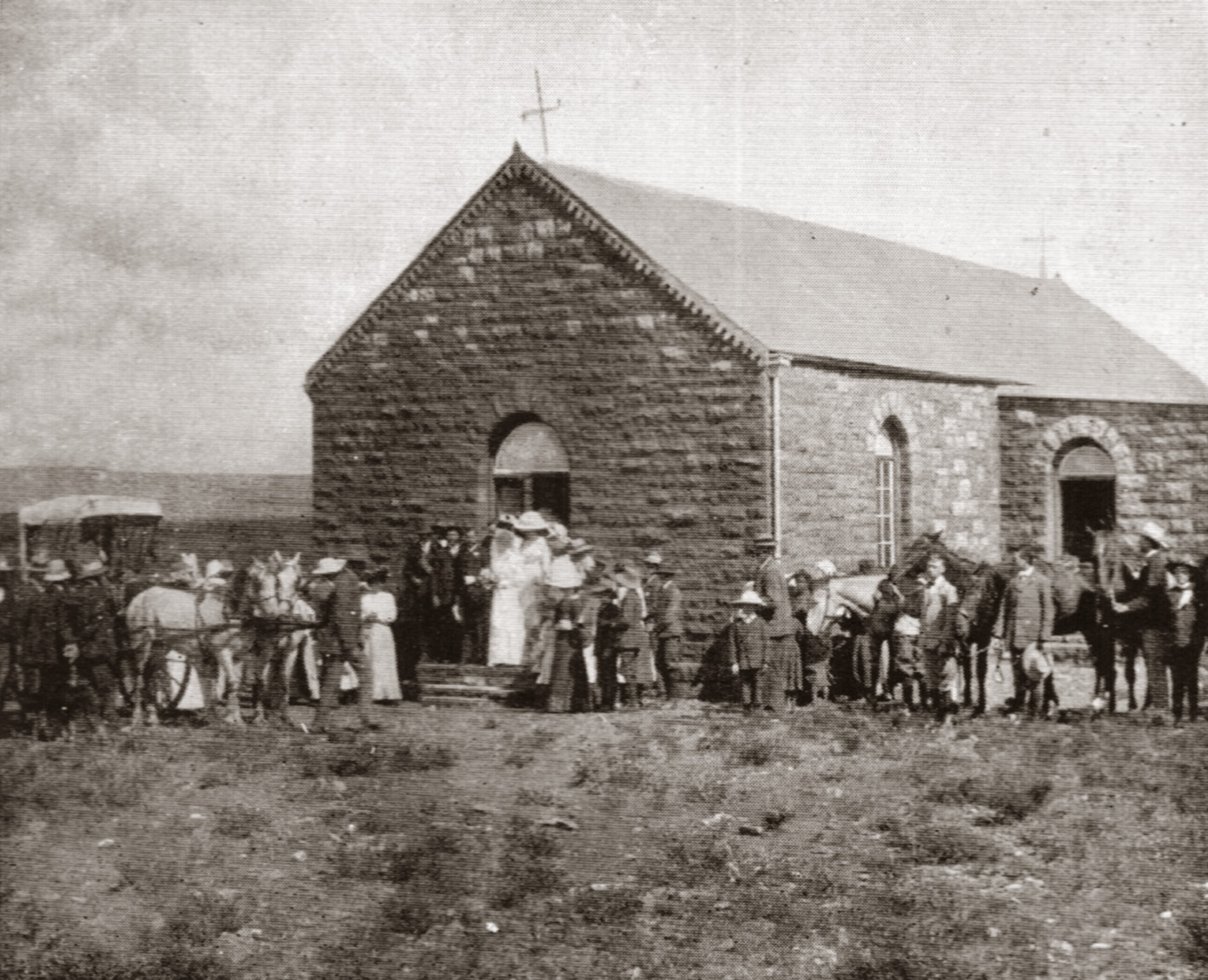 Kerkgebou van die NG gemeente Daniëlskuil